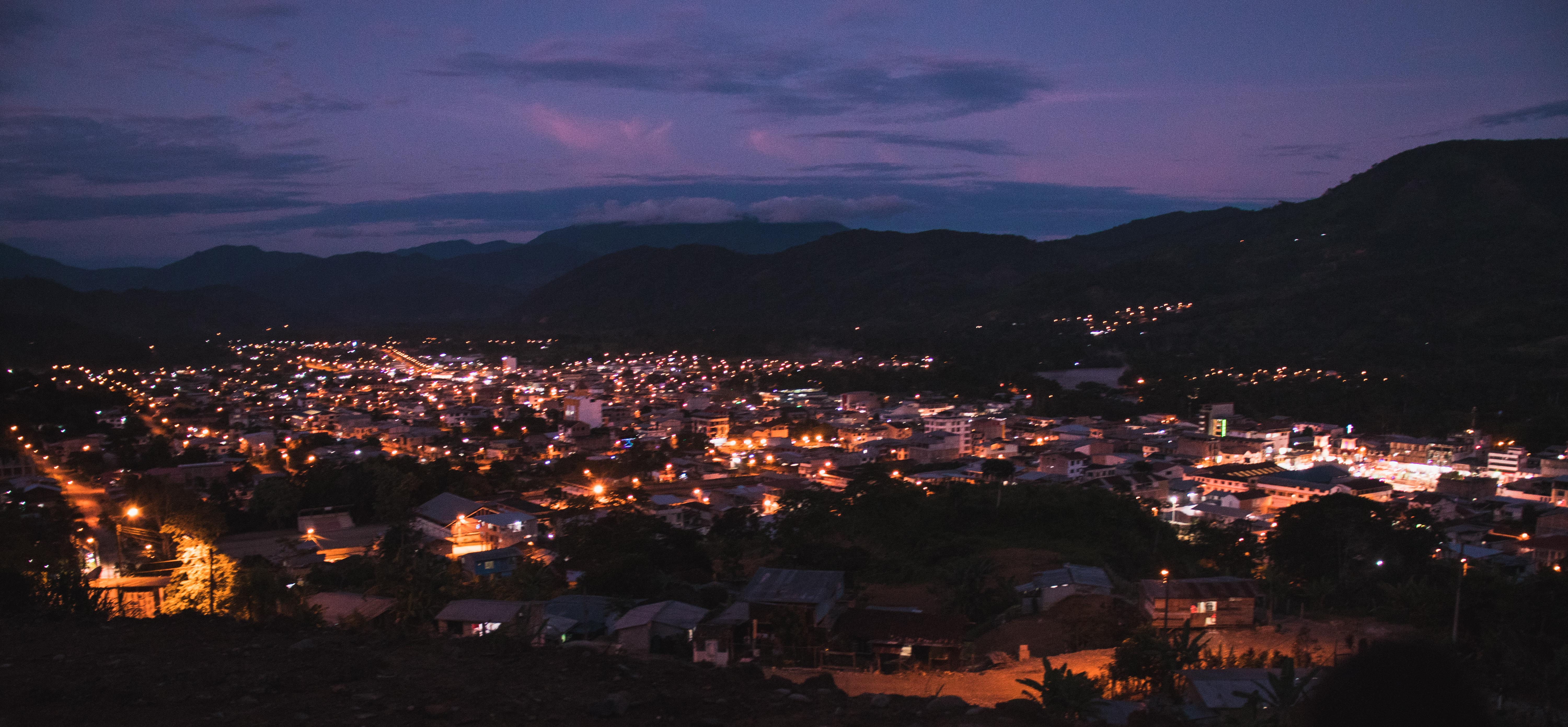 NOCHES DE YANTZAZA